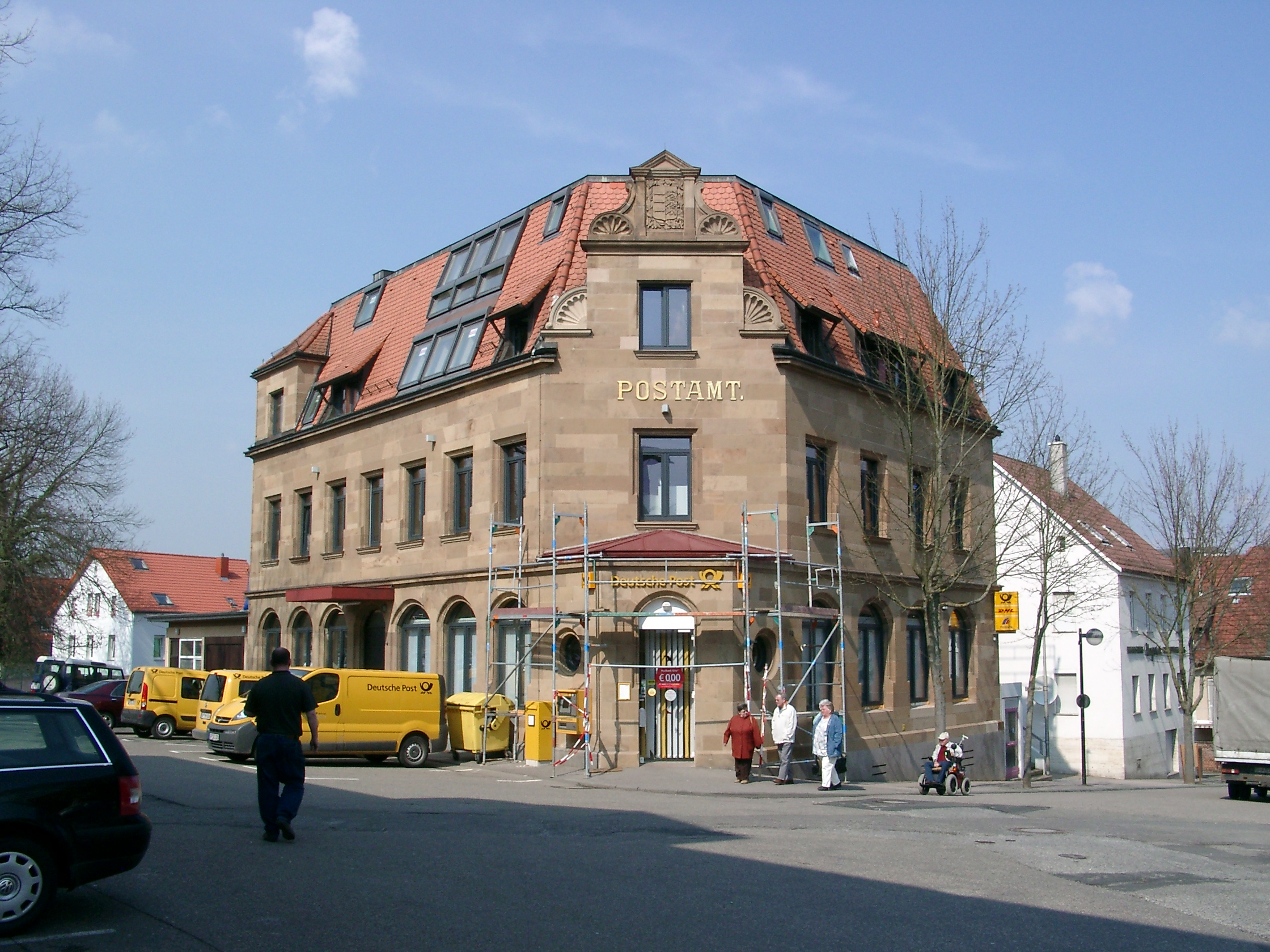 Weinsberg, Postamt beim Bahnhof